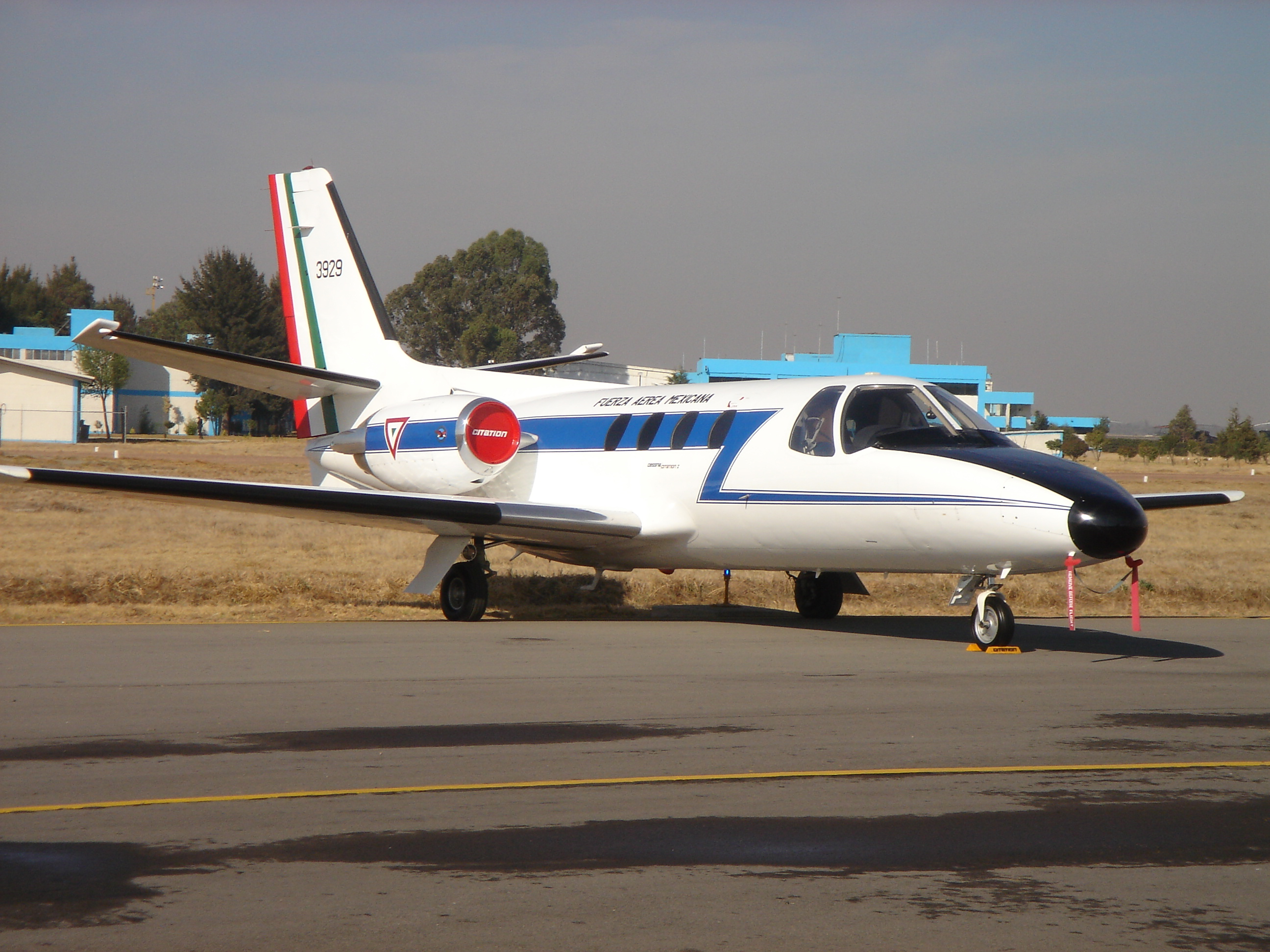 Cessna Citation 500 en la BAM No.1, Sta. Lucia.